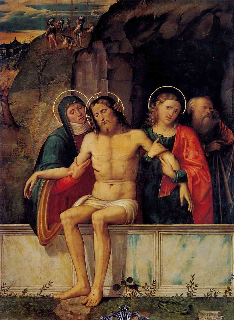 Deposizione di Cristo nel sepolcro